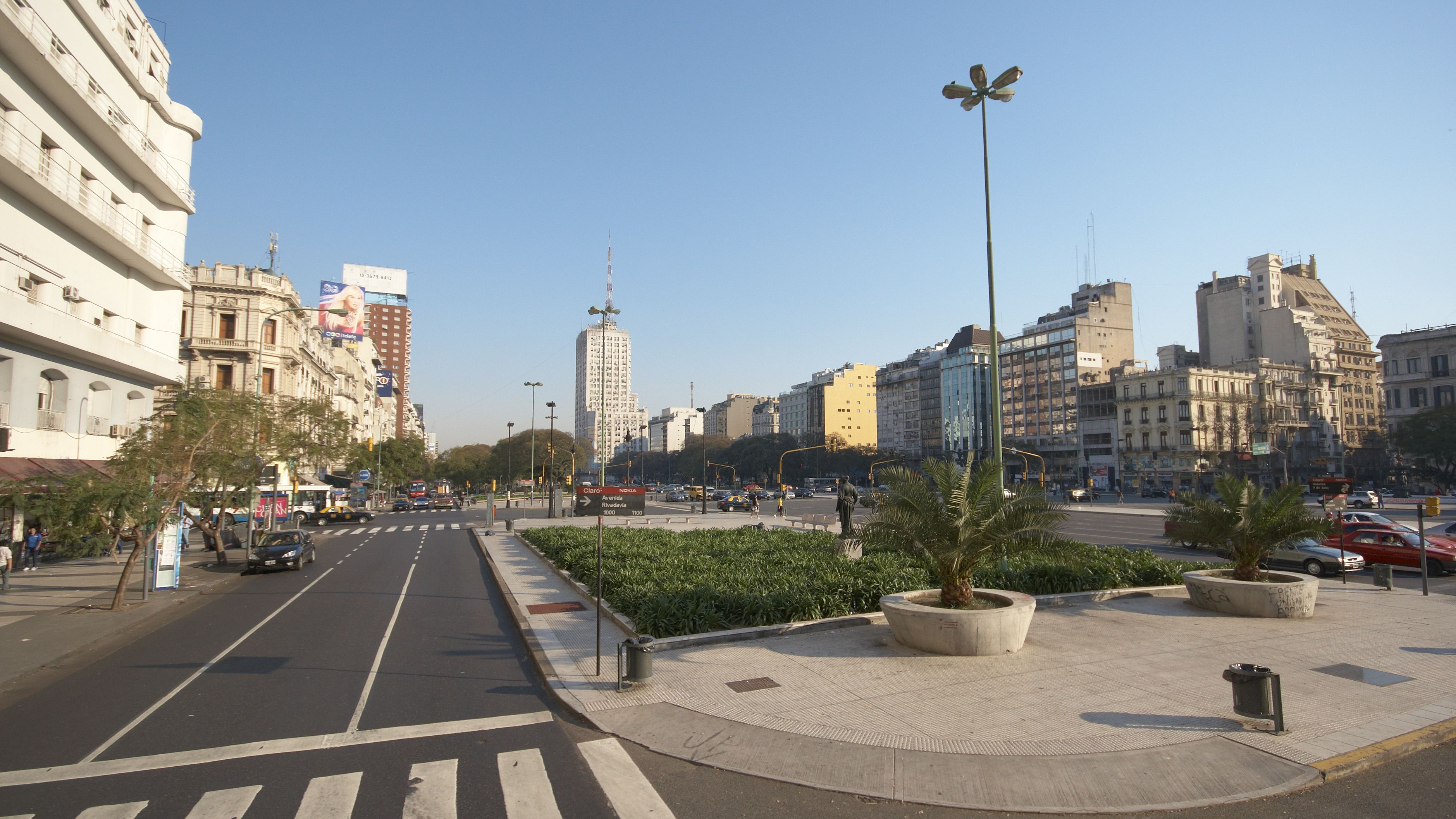 Calle Bernardo de Irigoyen vista desde calle Rivadavia, a la derecha se ve la Avenida 9 de Julio, Monserrat, Buenos Aires, Argentina.